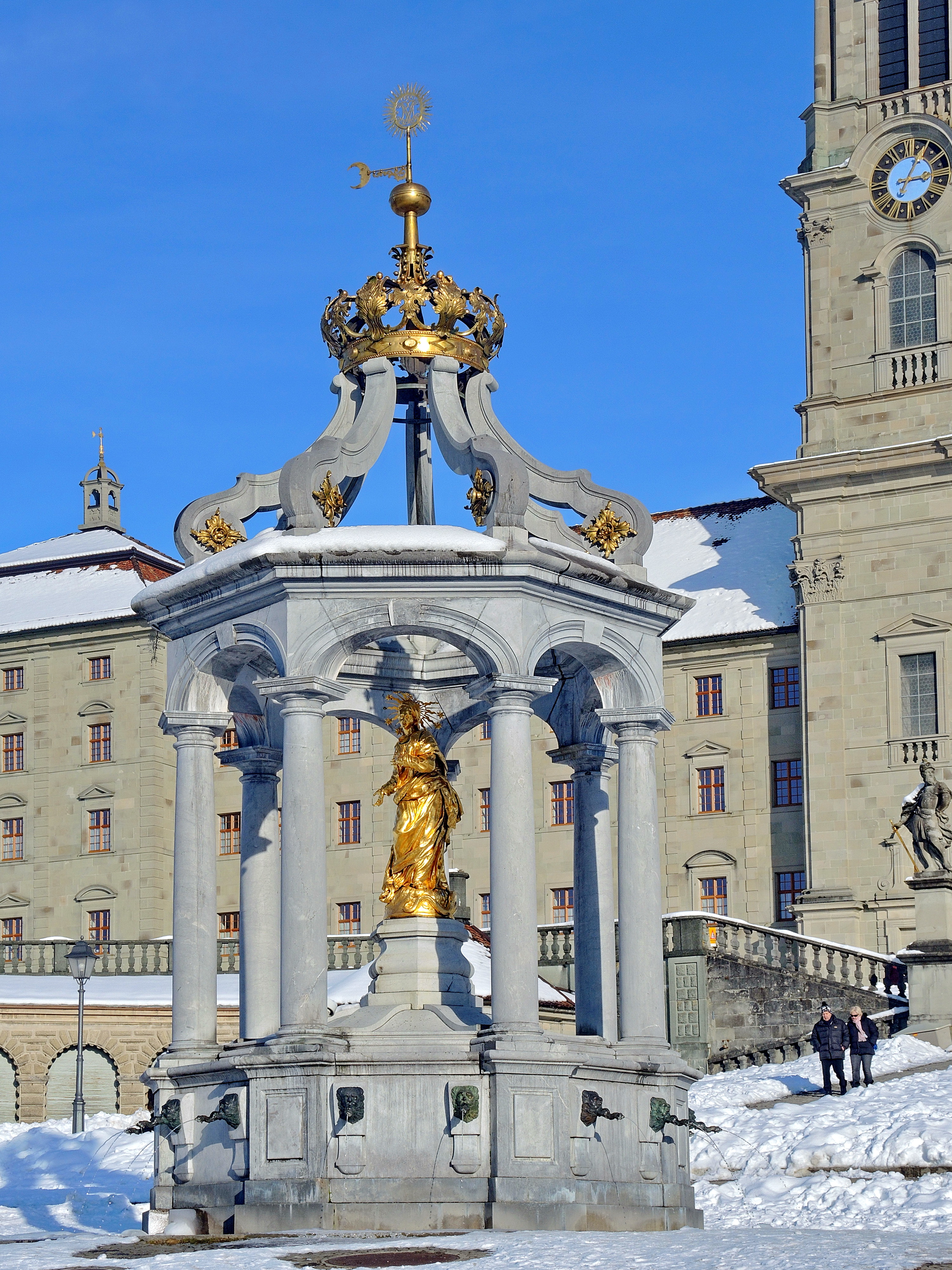 Marienbrunnen,Hauptplatz Kloster Einsiedeln in Einsiedeln (Switzerland)